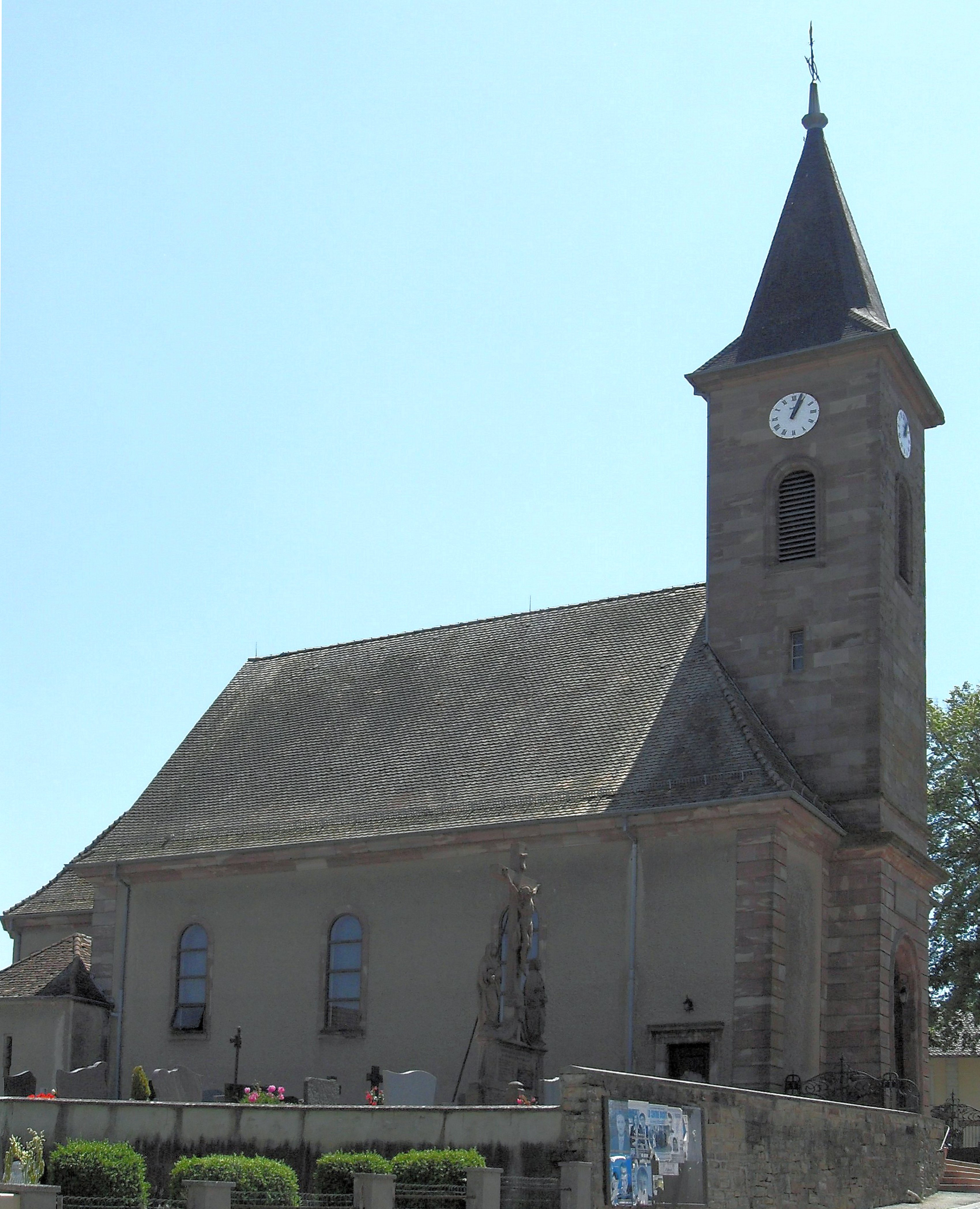 L'église Saint-Léger d'Eglingen